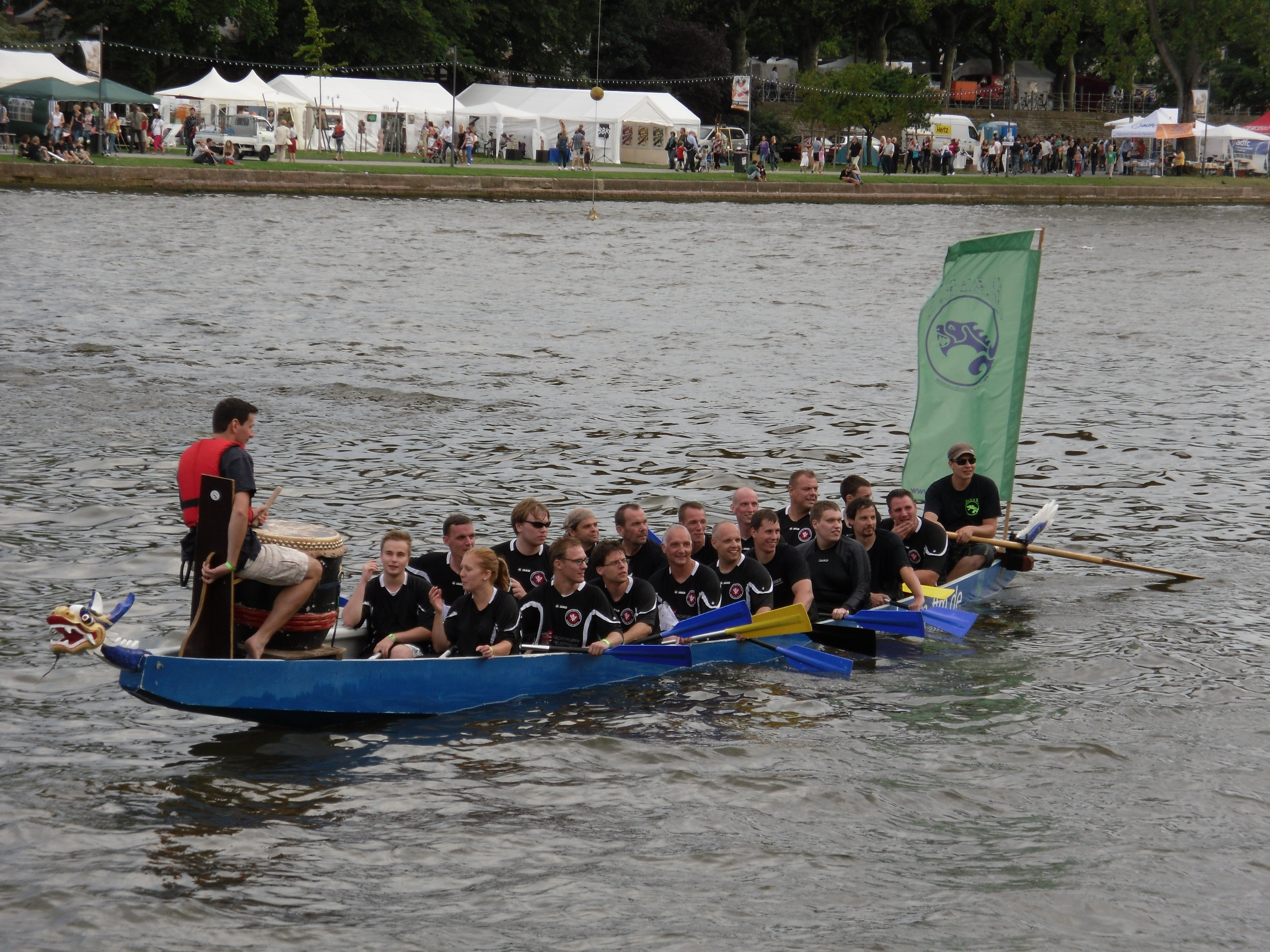 Ein Drachenbootteam des Feuerwehrsportvereins Frankfurt am Main beim Museumsuferfest in Frankfurt am Main.